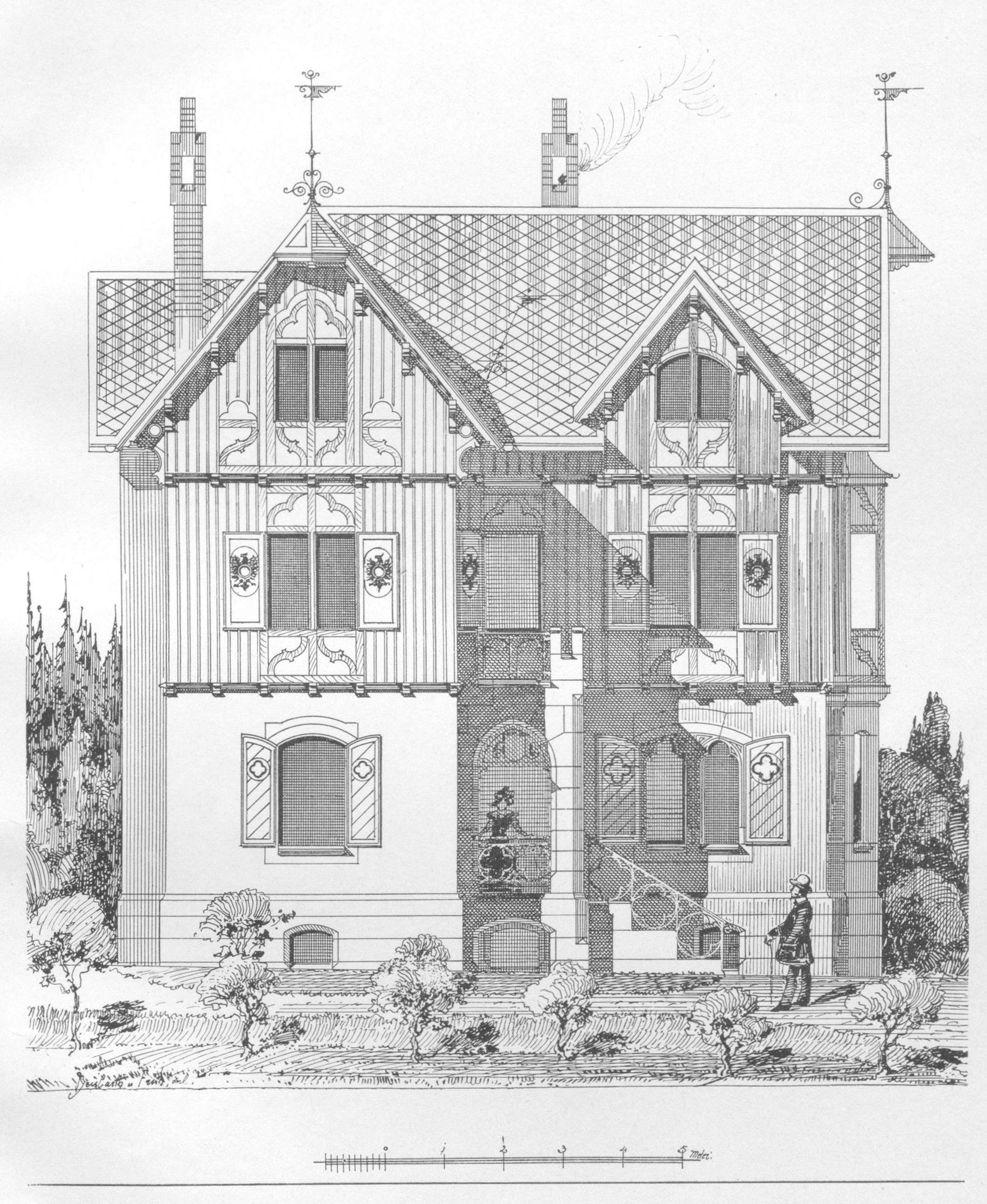 Landhaus Fabrikant C. Gross von Carl Friedrich Beisbarth jun., Stuttgart-Degerloch, Nägelestraße 10.